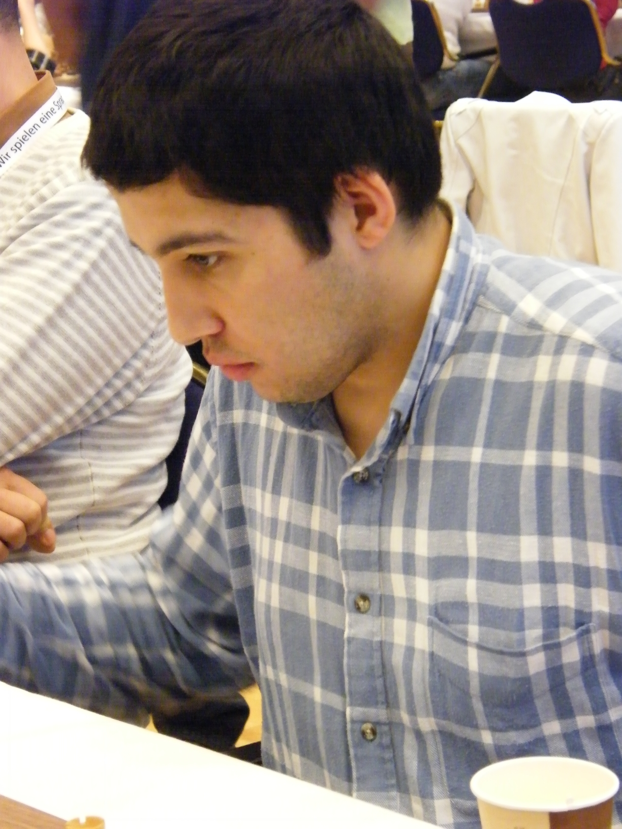 Ibragim Khamrakulov bei der 38. Schacholympiade in Dresden 2008